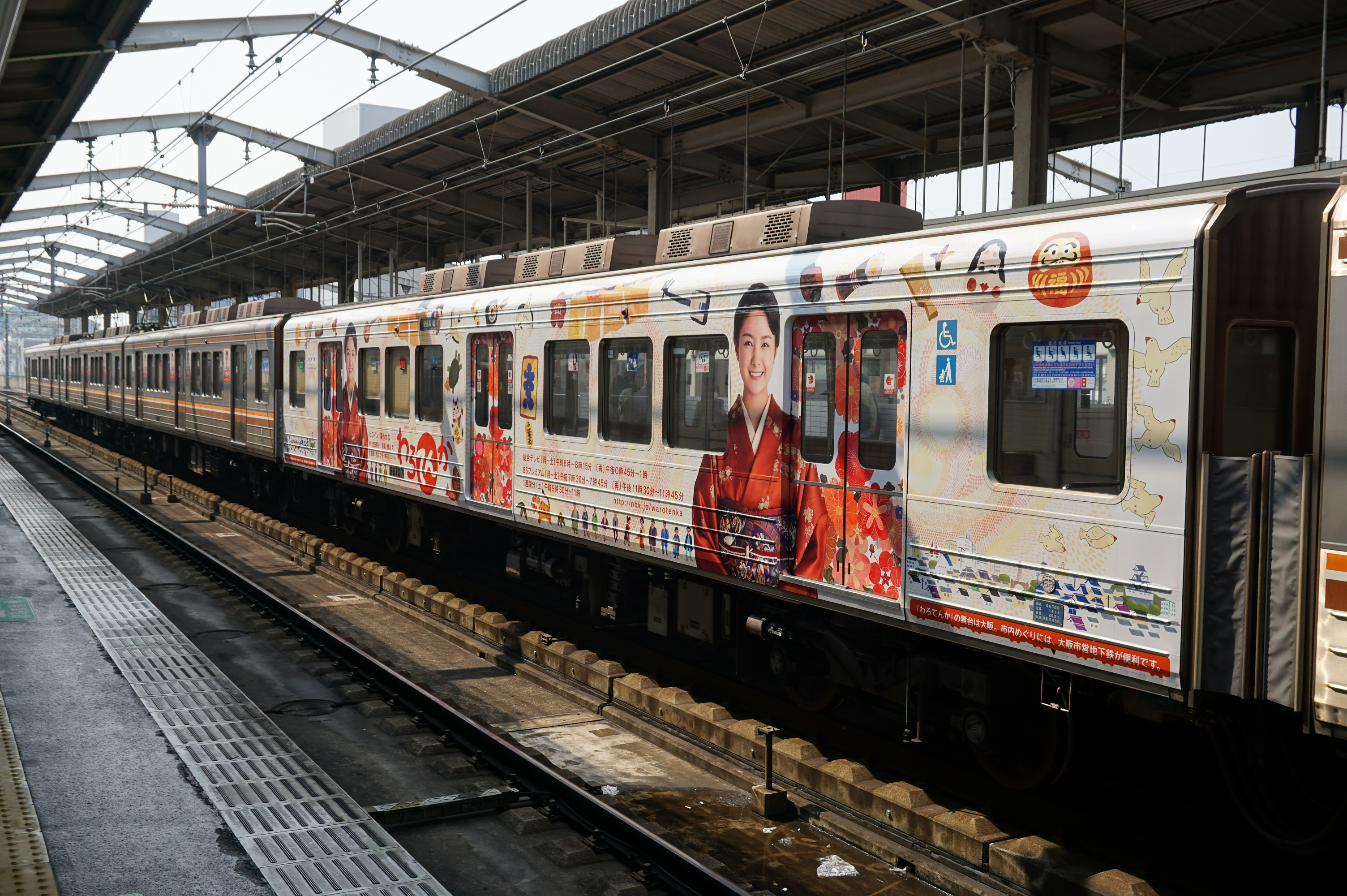 NHK朝ドラ「わろてんか」のラッピングが施された66707号車 Sony ILCE-6000